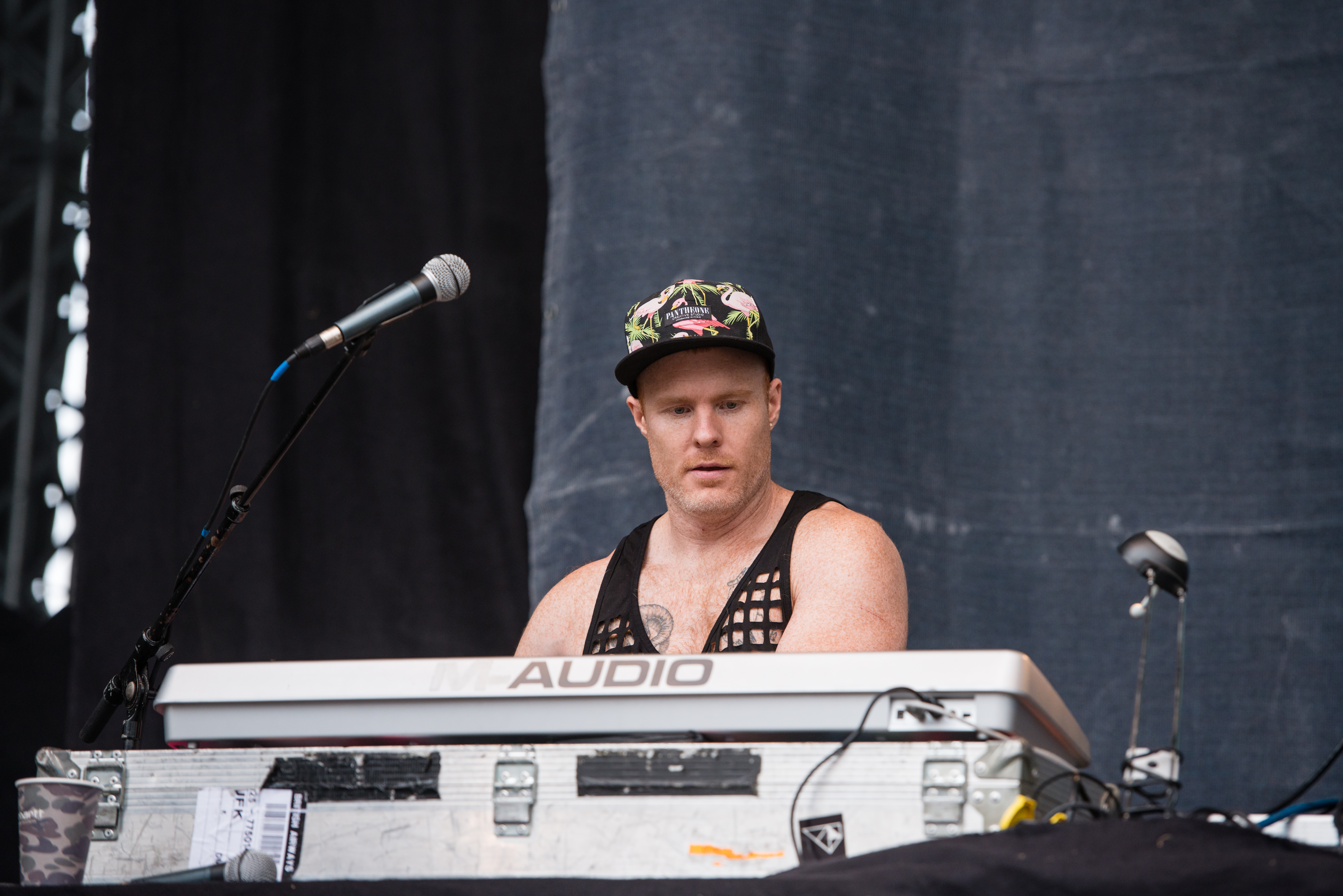 'Open Source Festival 2014 - Düsseldorf': 'Hercules & Love Affair'